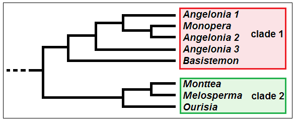 Angelonieae - Cladogramma della tribù